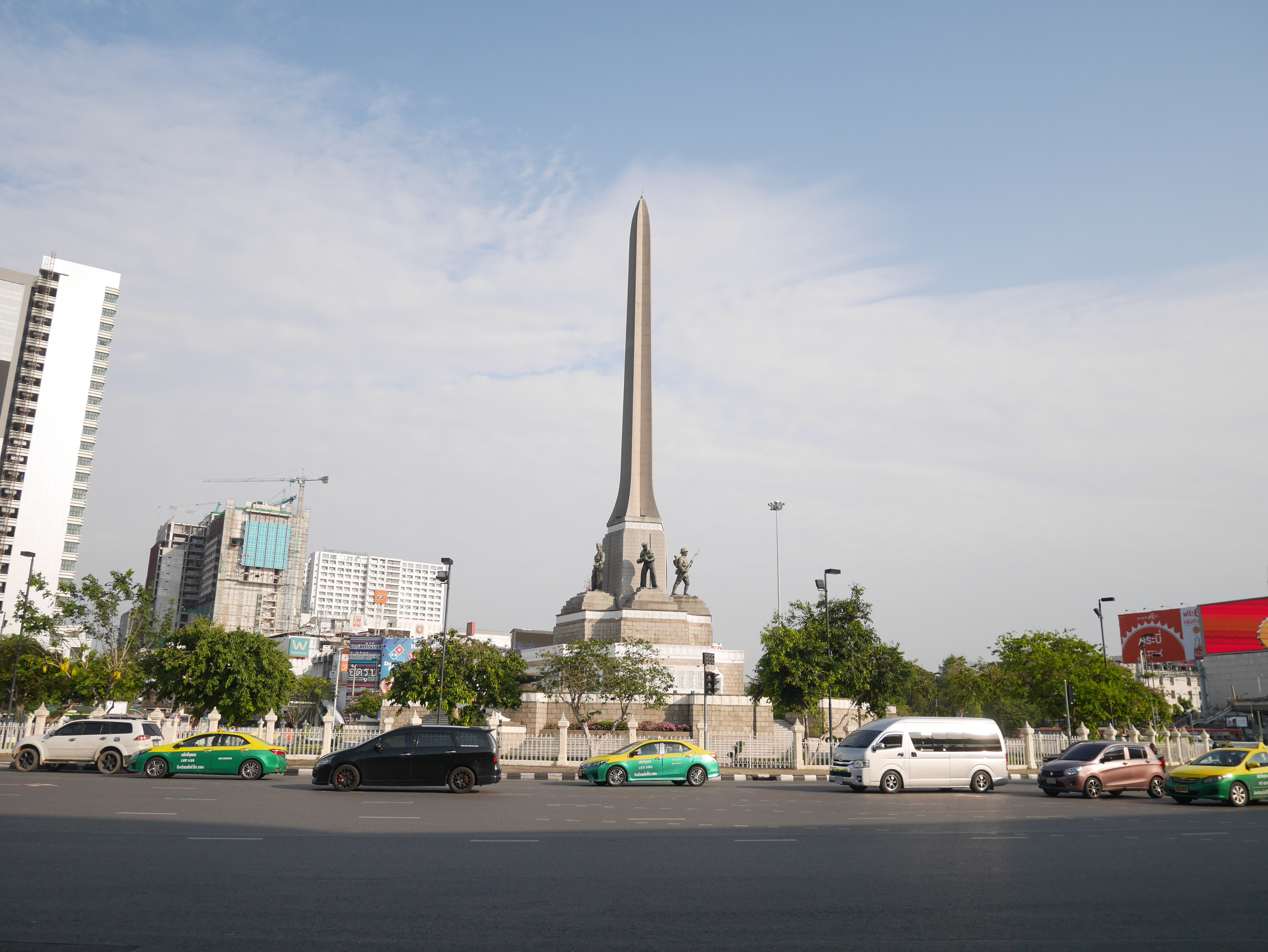 อนุสาวรีย์ชัยสมรภูมิ เจ้าของบัญชี กสิณธร ราชโอรส เป็นเจ้าของบัญชีเดียวกับ บัญชี Phonlakrit Sunthornphon ของ Facebook บัญชี Tsutomu RIkimi ของ Google และ Panoramio .com บัญชี ซูบารุโยของ กสิณธร ราชโอรส same account holder of Facebook (Phonlakrit Sunthornphon),Google and (Tsutomu RIkimi) and ซูบารุโย at